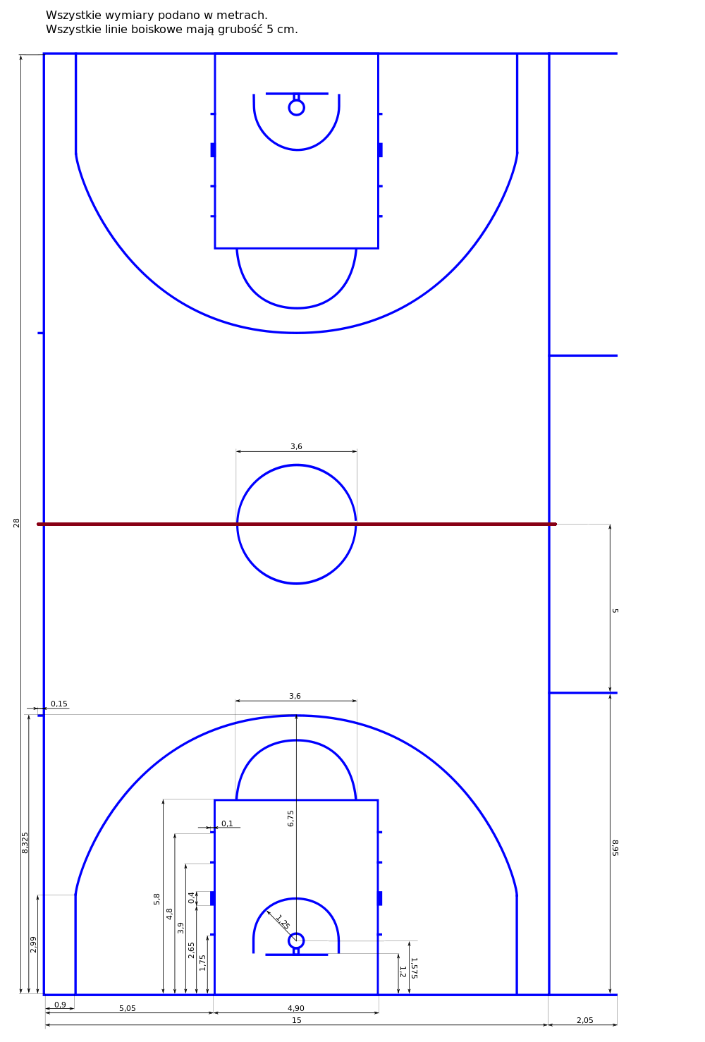 linia połowy (koszykówka)